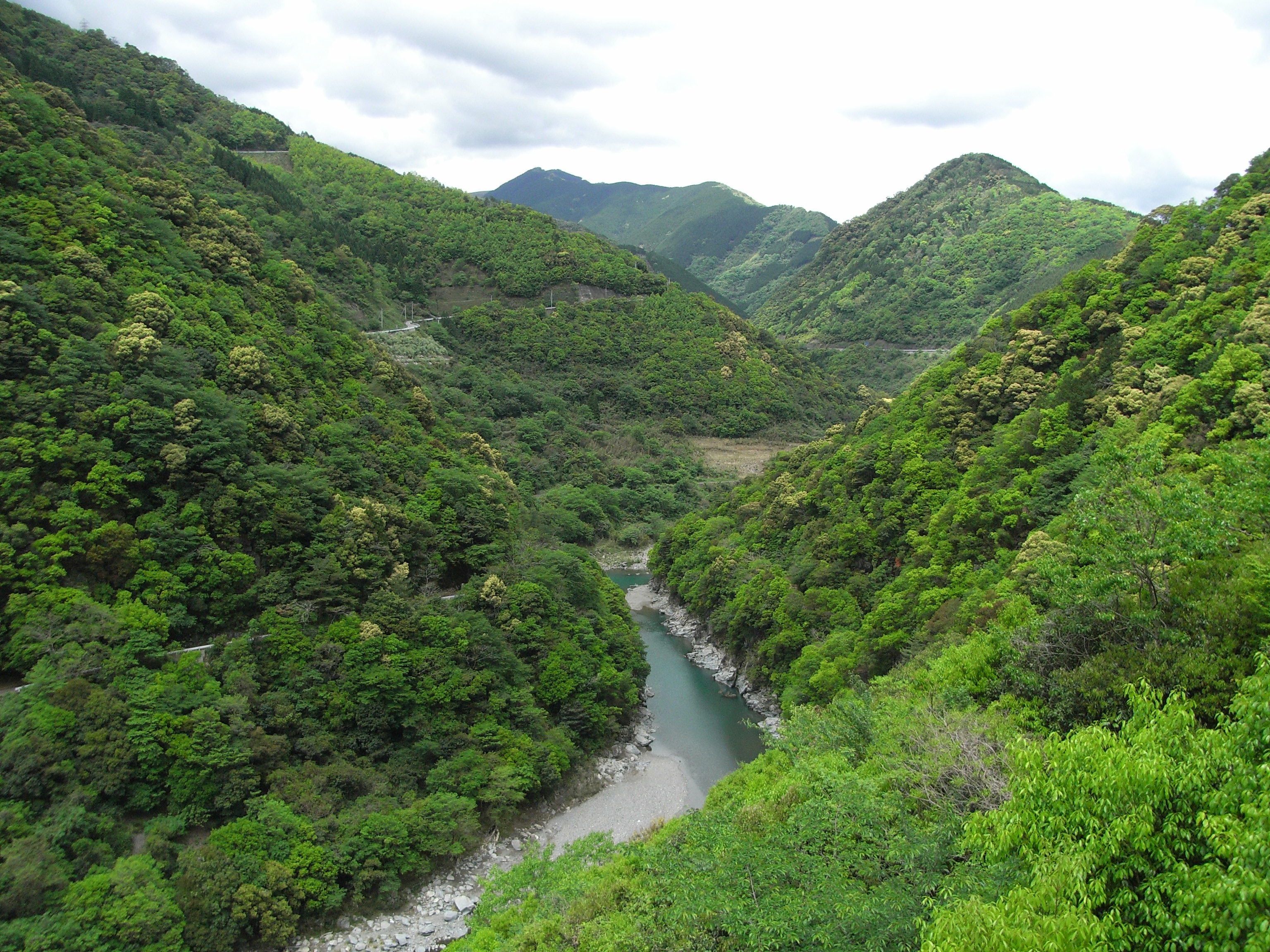 Dam